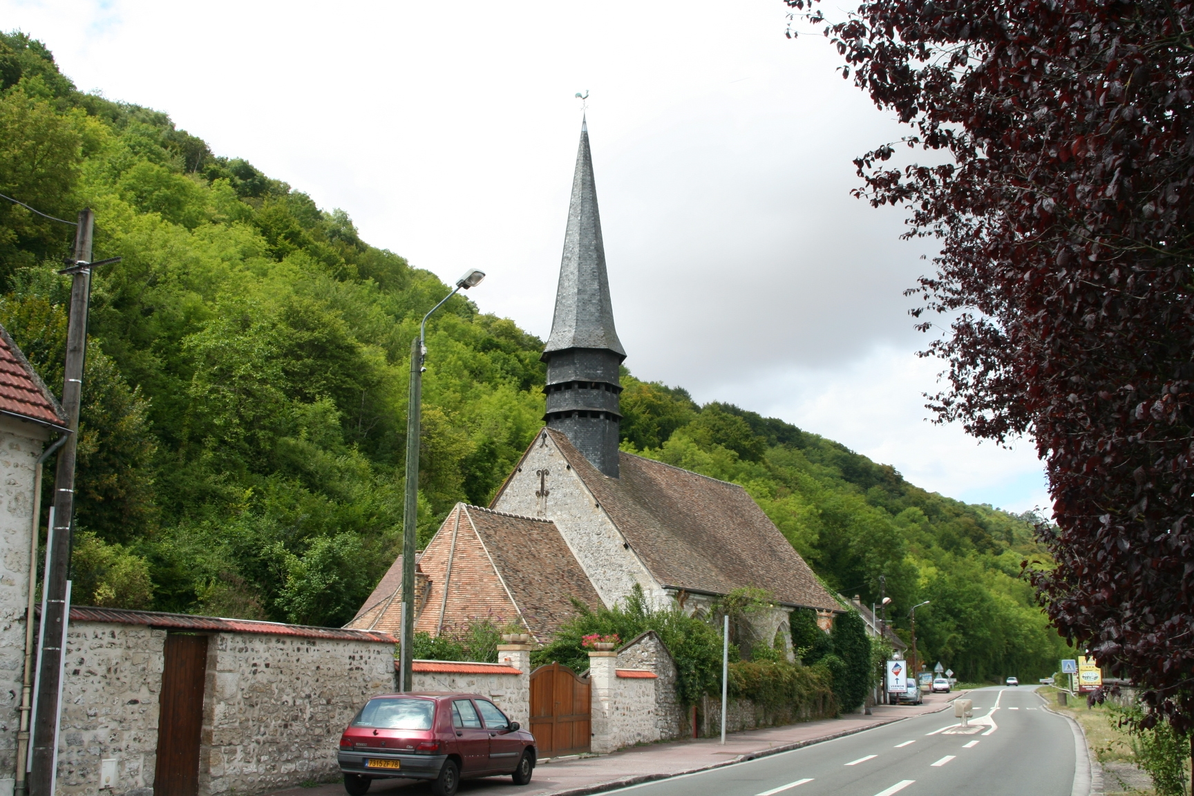 Église de jeufosse, Yvelines (France)